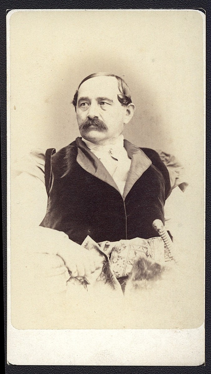 Antoni Zygmunt Helcel (1808-1870); autor: Walery Rzewuski (1837-1888)